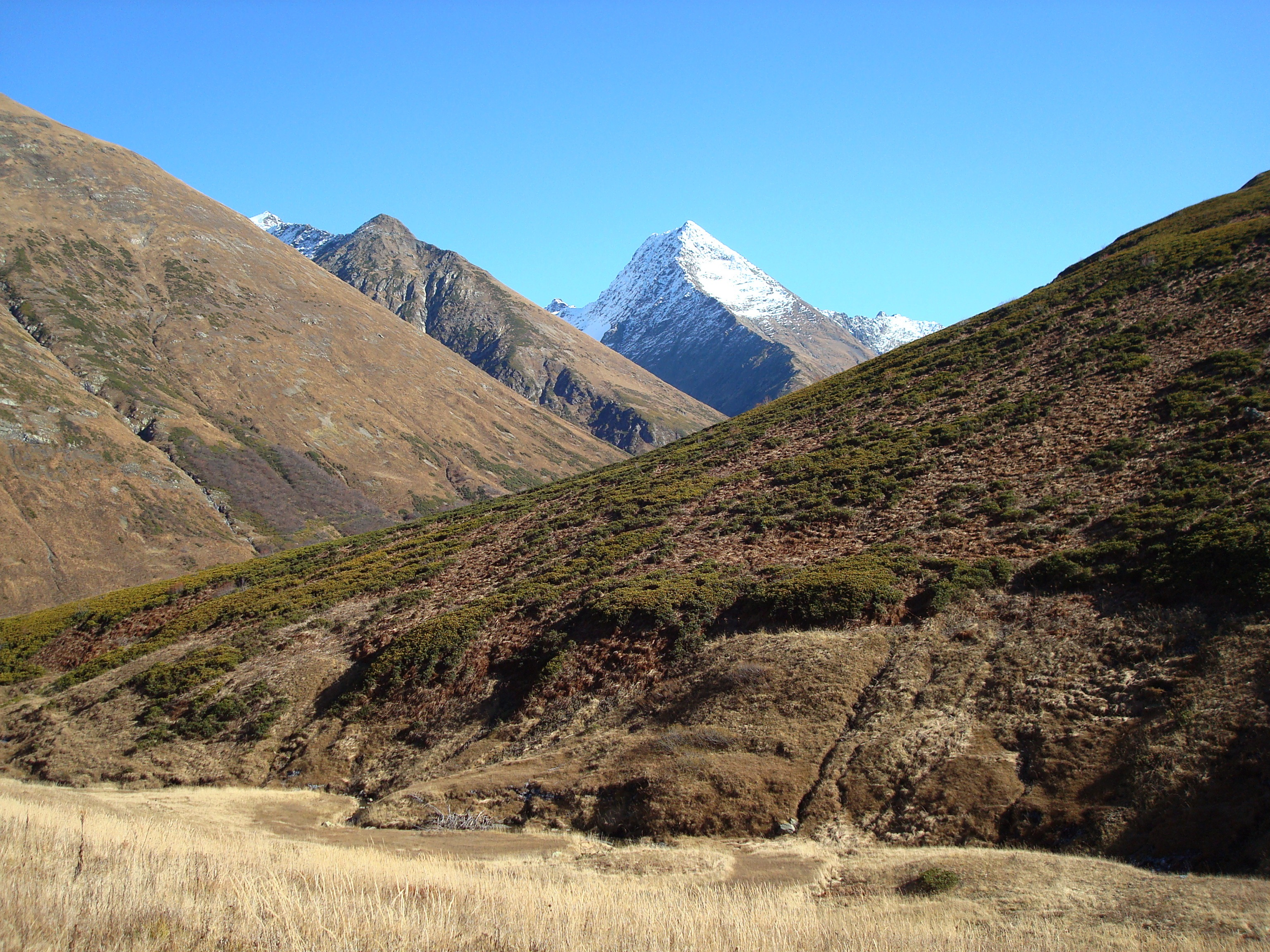 Вид на пик Сахарный Псеашхо осенью. Кавказский государственный природный биосферный заповедник. This image is related to the protected area of Russia number 2300002